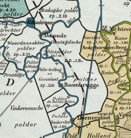 Polders rond Baambrugge